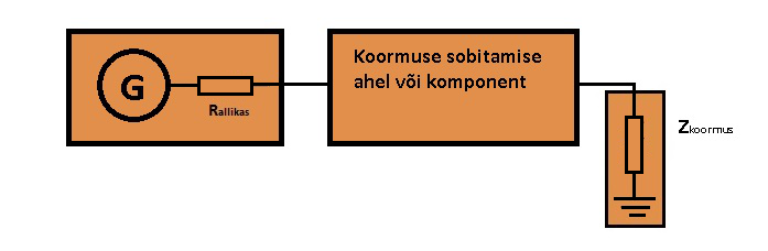 Sobituslüli allika ja koormuse vahel. Tehtud MS Paintiga.